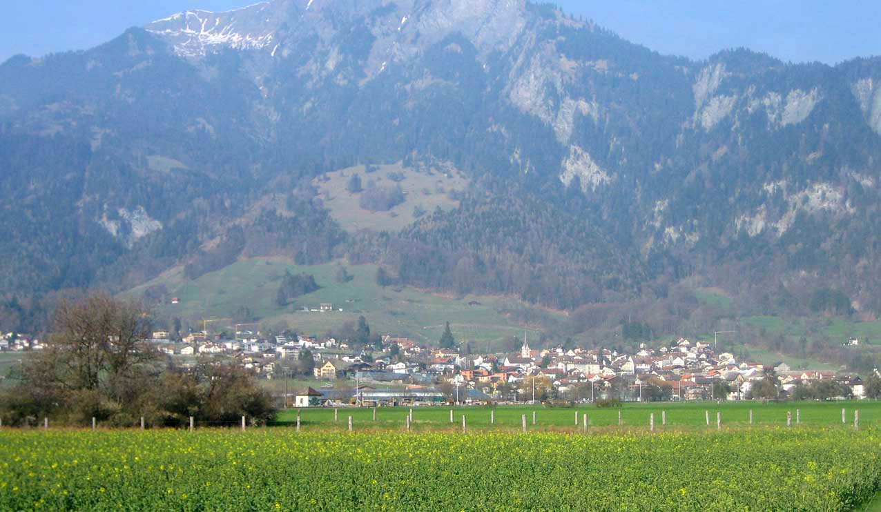 Malans